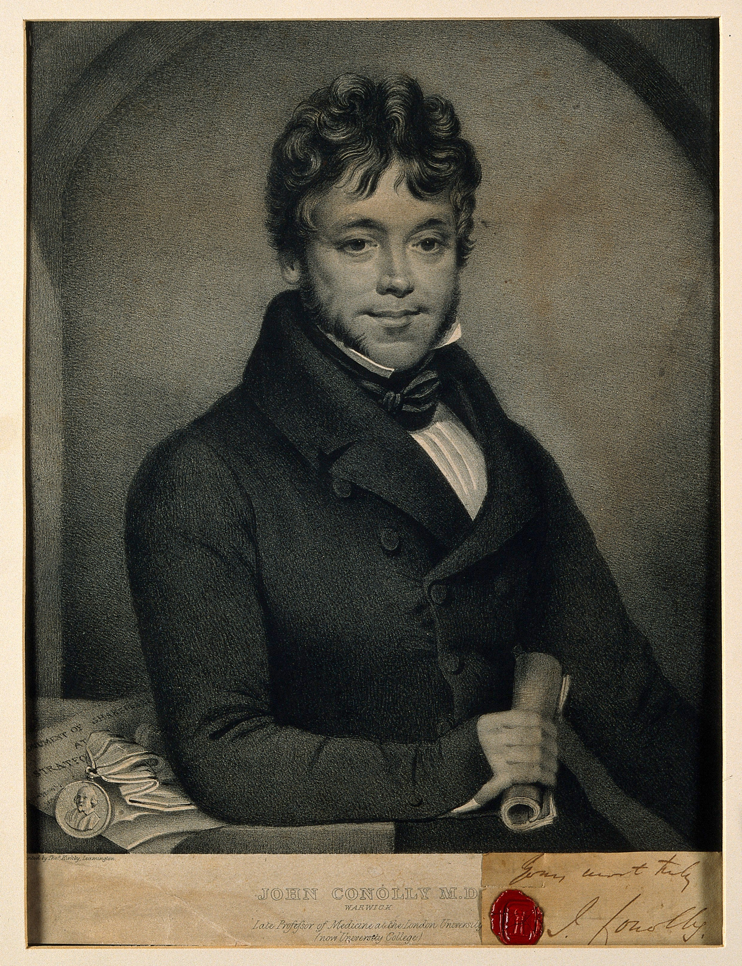 John Conolly. Lithograph by T. M. Bayes after T. Kirkby